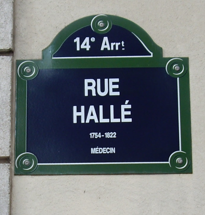 Plaque de la rue Hallé, Paris 14e, en mémoire du médecin Jean Noël Hallé (1754-1822), professeur au Collège de France, membre de l'Académie nationale de médecine et membre de l'Académie des sciences.